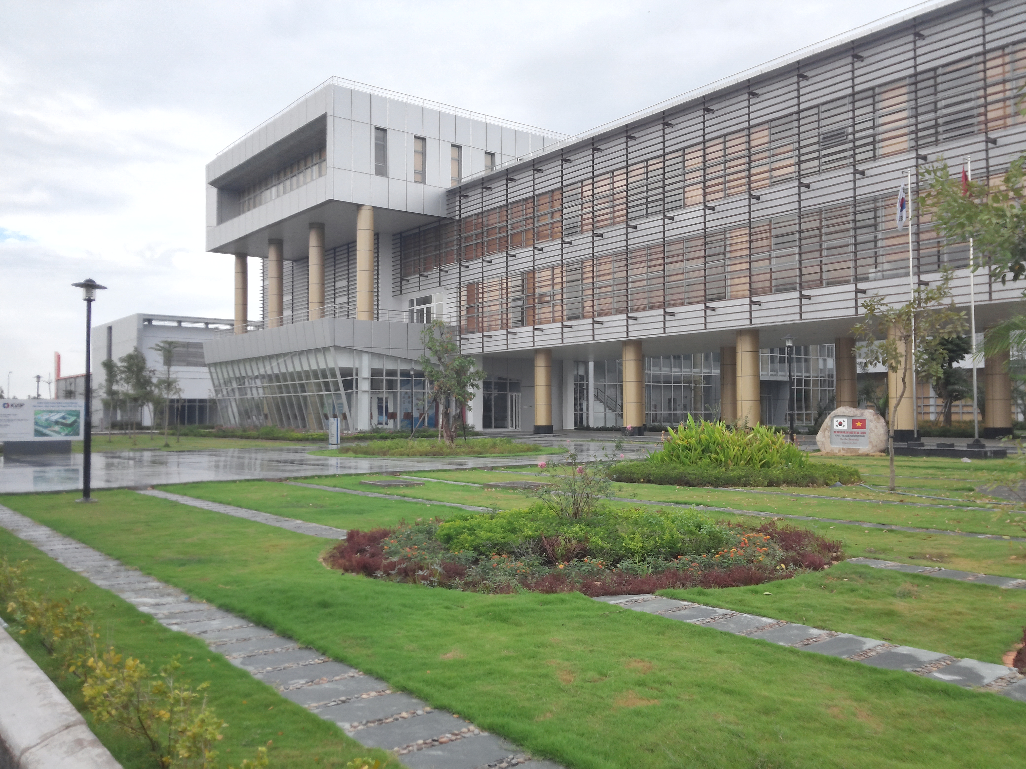 Mặt sảnh của Vườn ươm